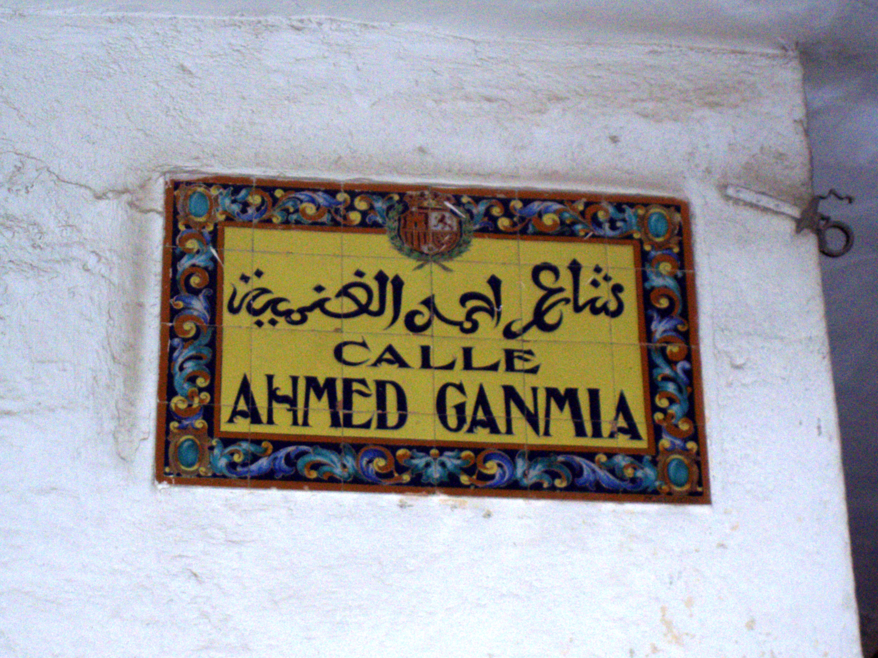 Placa con nombre de la Calle Ahmed Ganmia en Tetuán (Marruecos). Se aprecia el escudo español de los años 20.